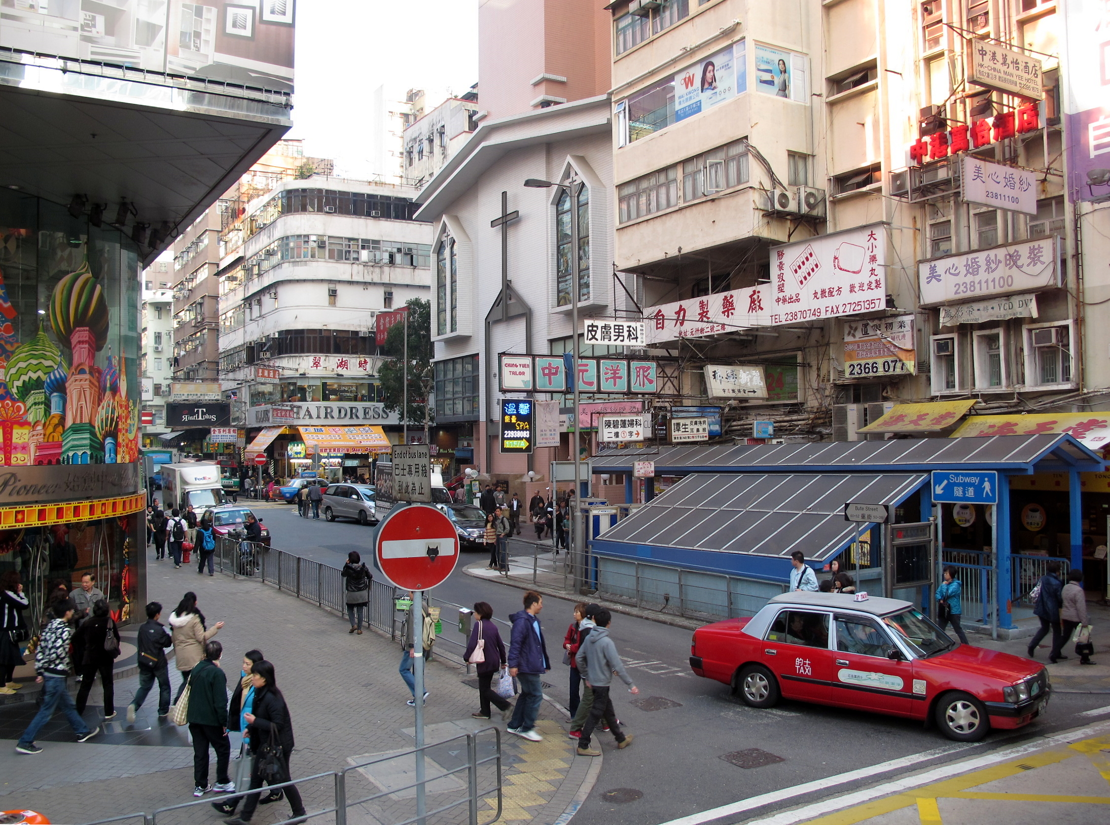 Bute Street 弼街